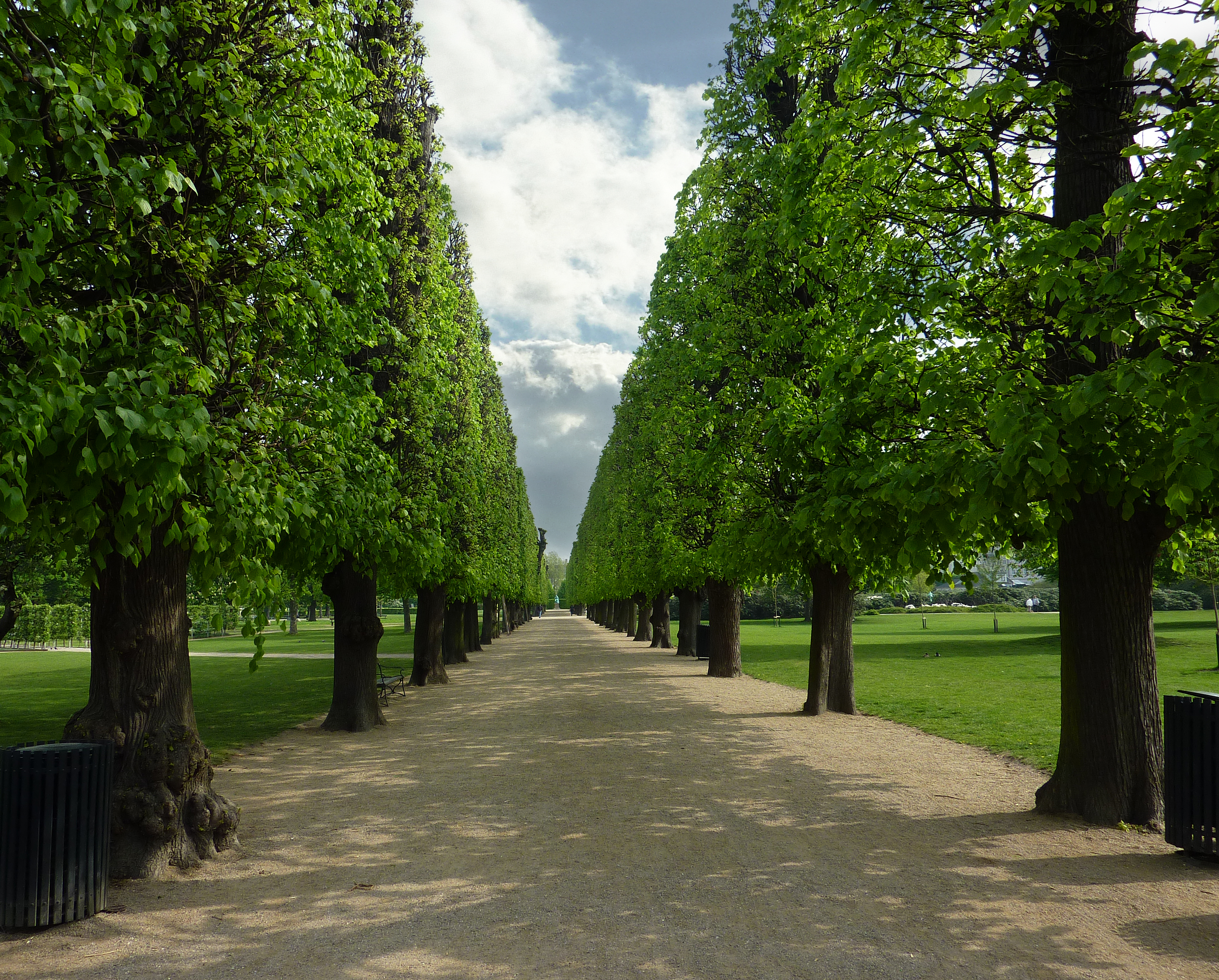 A tree-lined avenue in Rosenborg Castle gardens in Copenhagen, Denmark